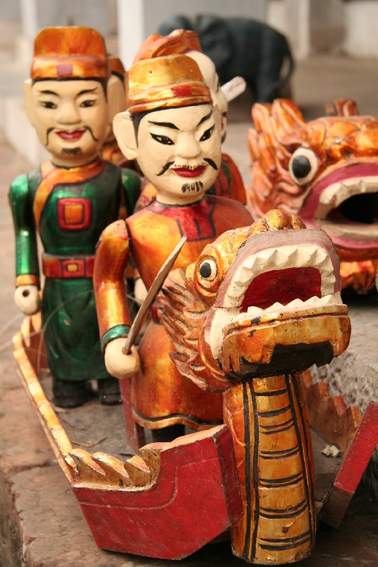 Water puppets